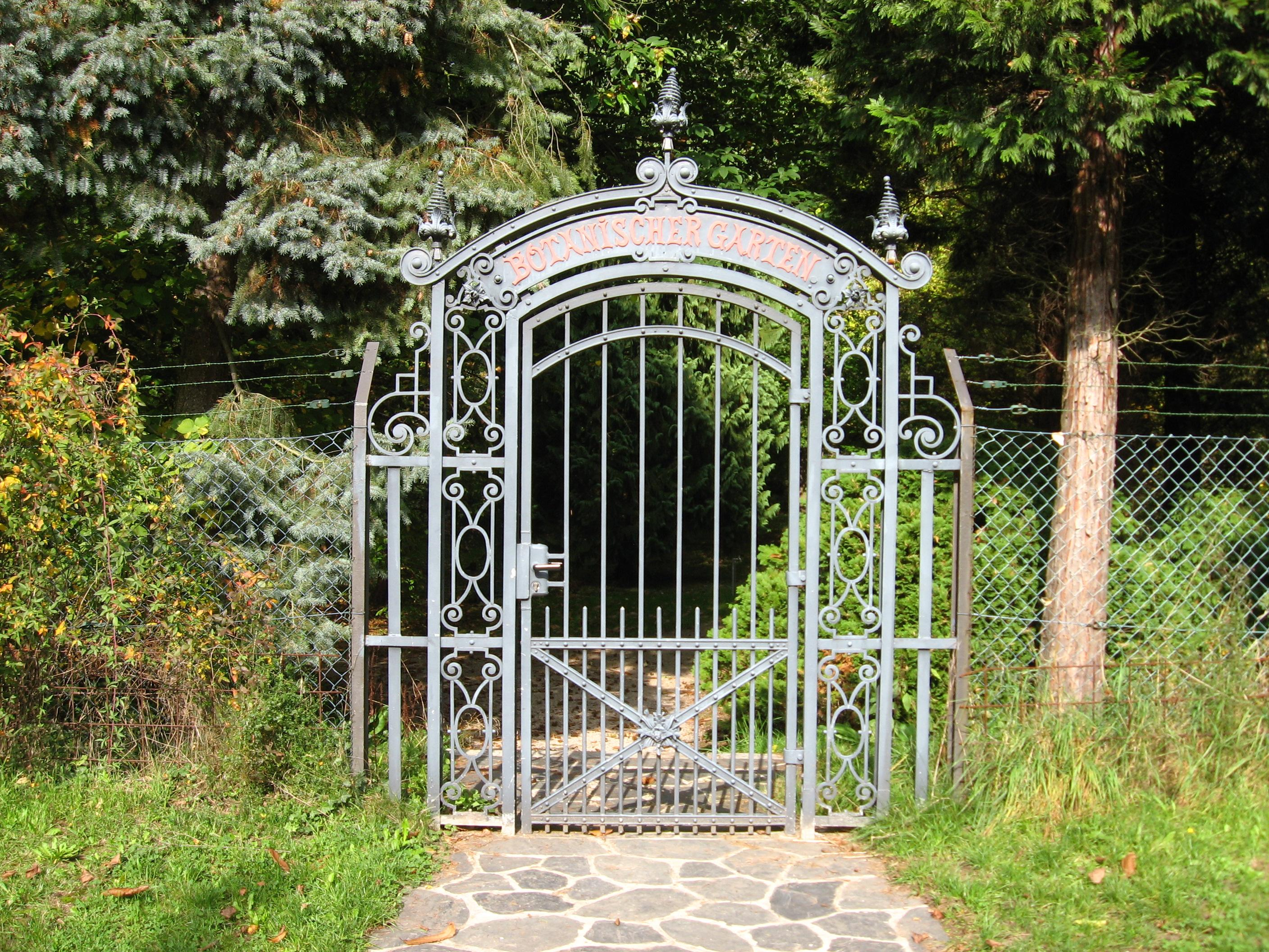 Alter Eingang des Botanischen Gartens, Darmstadt